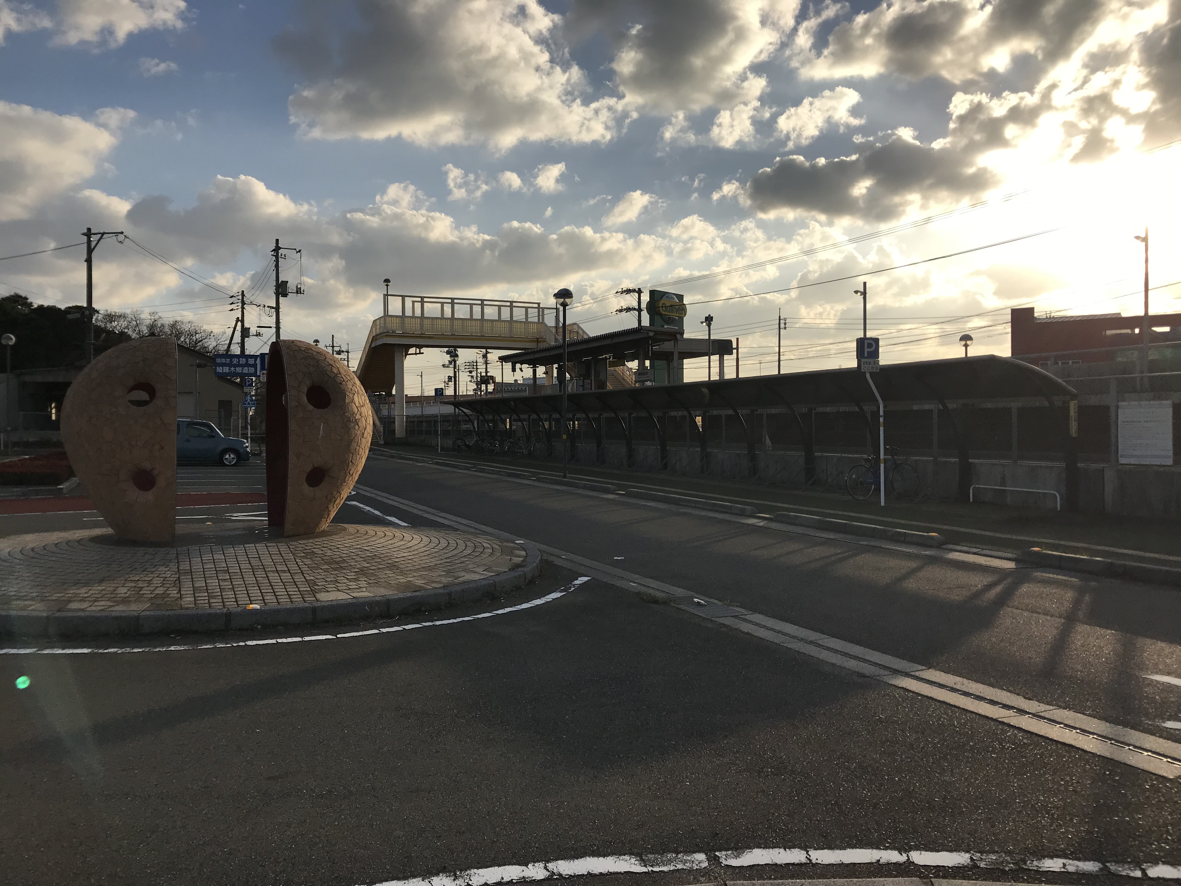 梶栗郷台地駅の遠景